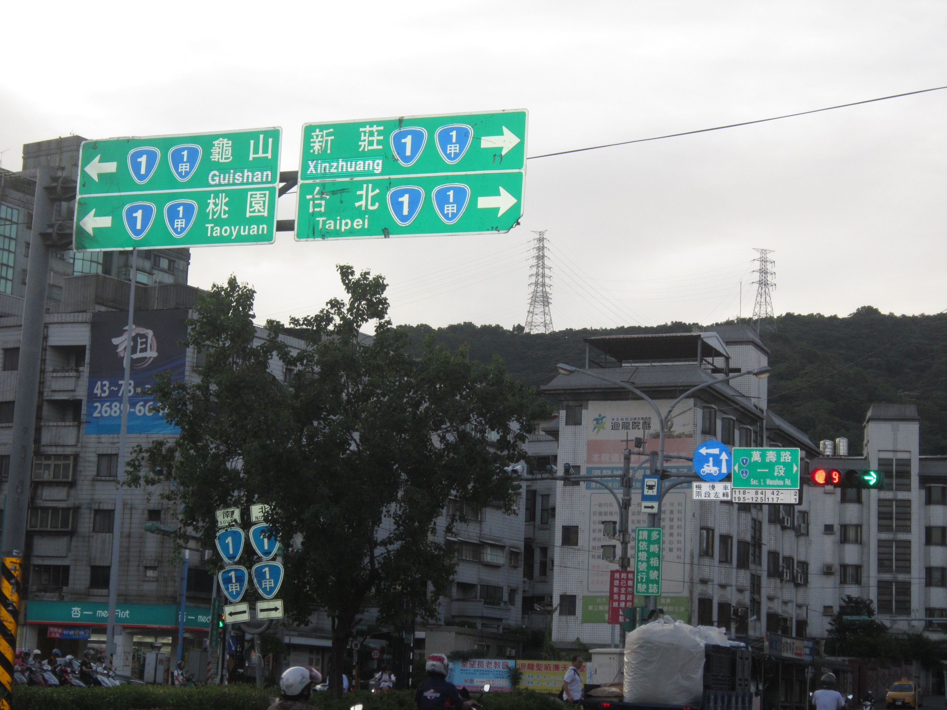 台1線和台1甲線在桃園及新北市交界的迴龍段共線(龜山區萬壽路)